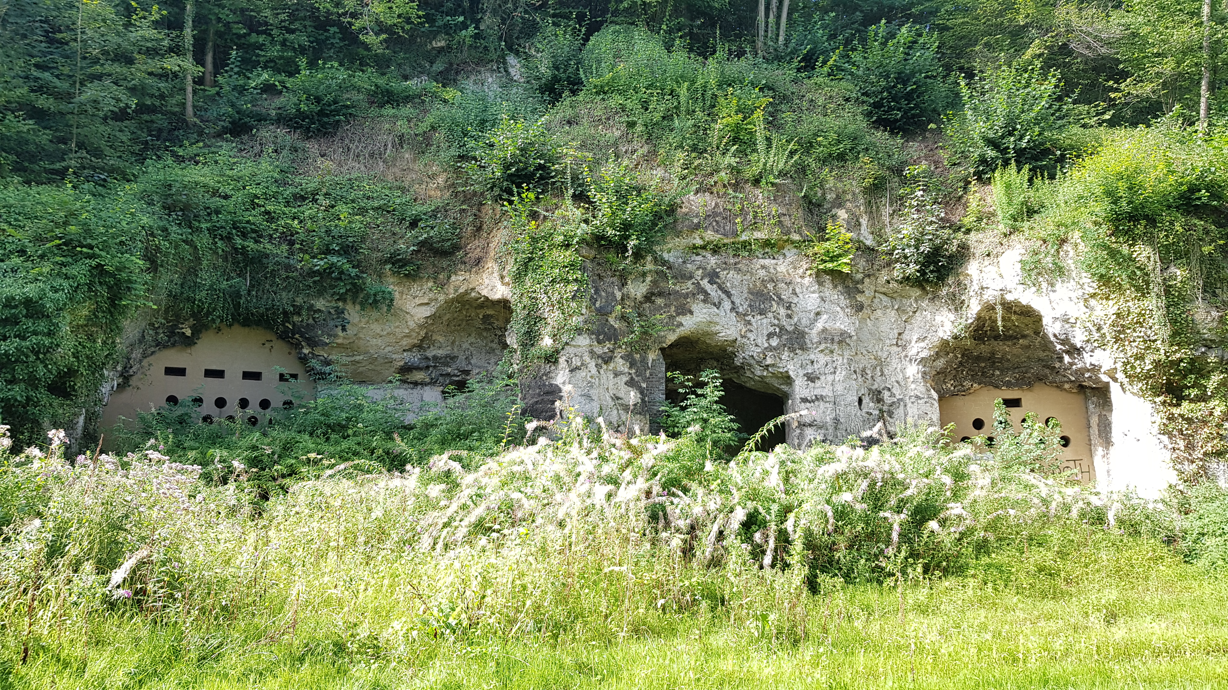 Bonsdalgroeve west, Bronsdaelgroeve, Geulhem, Nederland